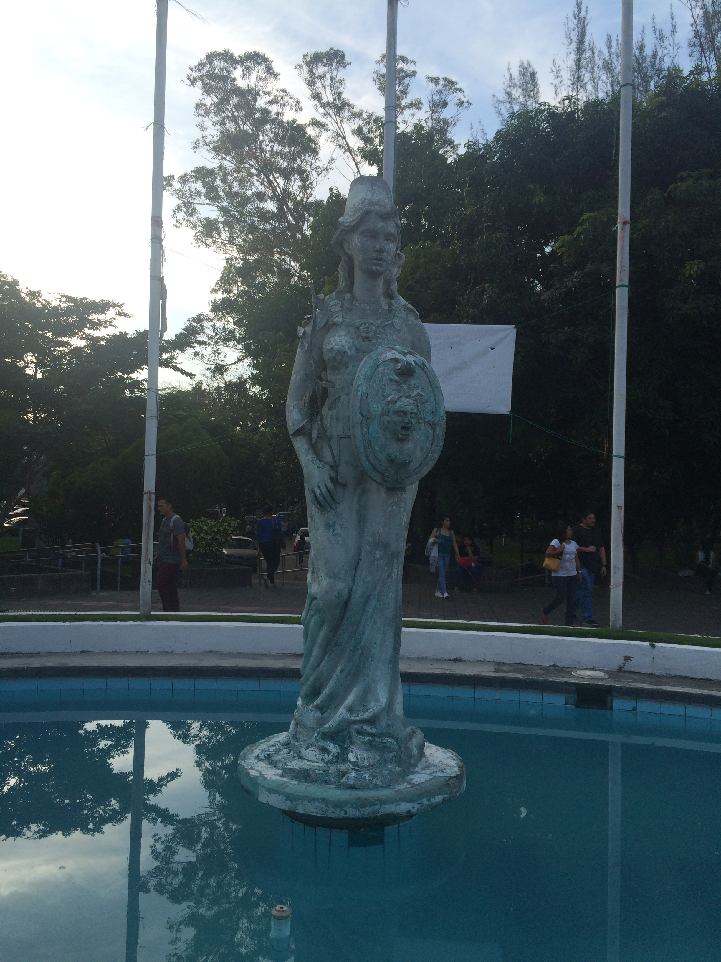 Estatua de Minerva en la entrada principal de la Universidad de El Salvador.